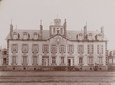 Domaine d'Avoise - Le chateau